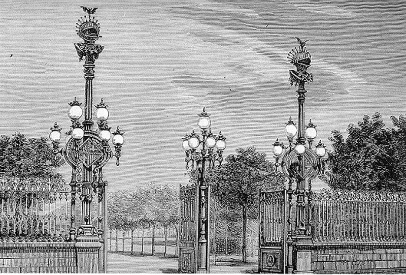 Farolas de la reja de entrada del parque de la Ciudadela, grabado del siglo XIX.